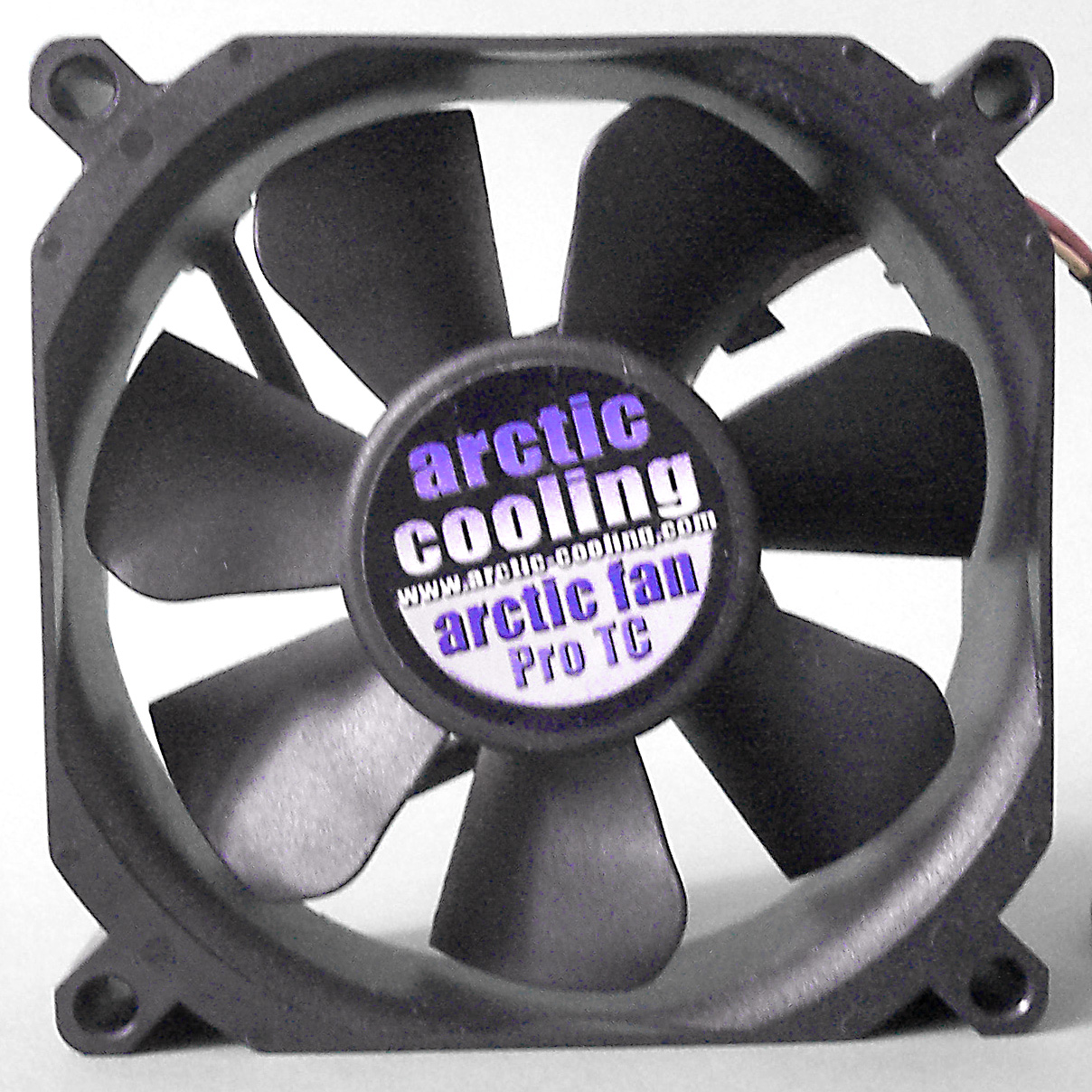 Gehäuselüfter Frontal, 80*80*25 mm, 1000 -- 2500 RPM, Arctic cooling fan Pro TC